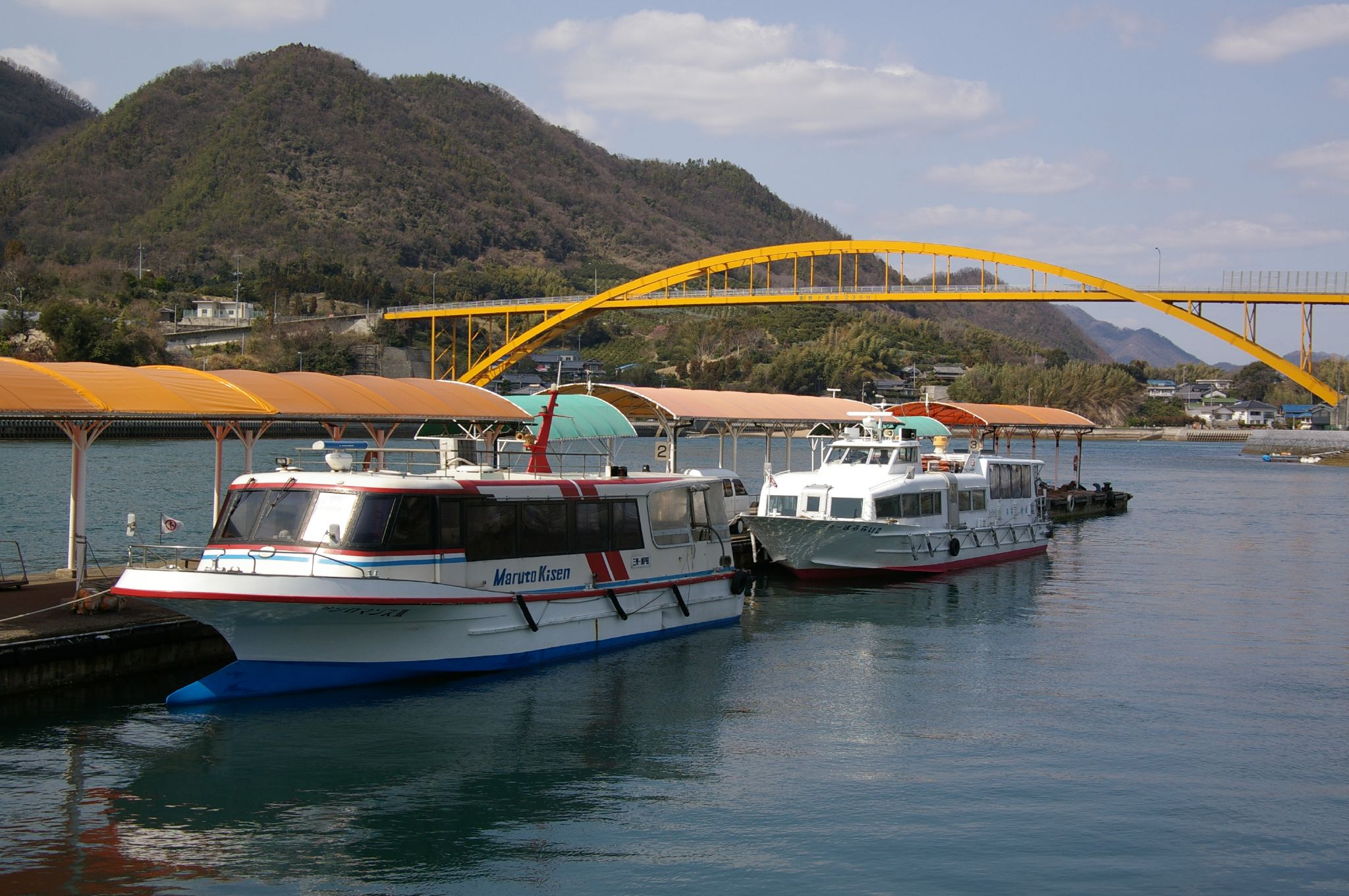 Setoda, Koune bridge